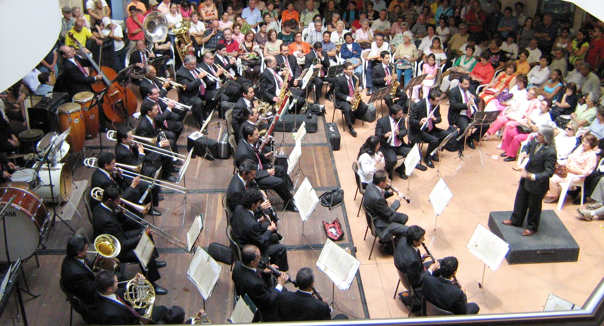 Banda Sinfónica Universidad de Antioquia, concierto en el centro comercial Unicentro, Medellín, Colombia.